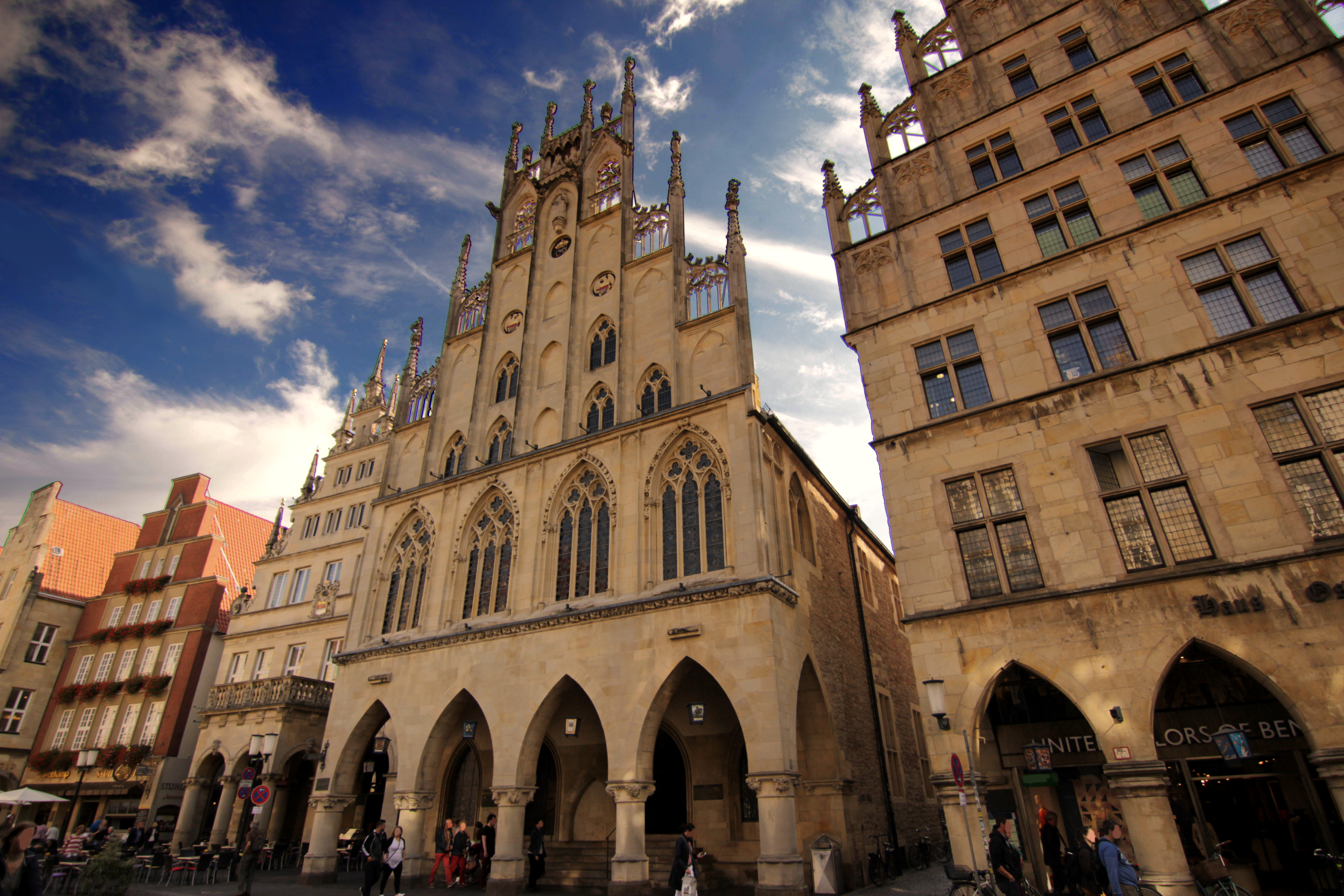 Historisches Rathaus Münster, aufgenommen am 29. September 2016